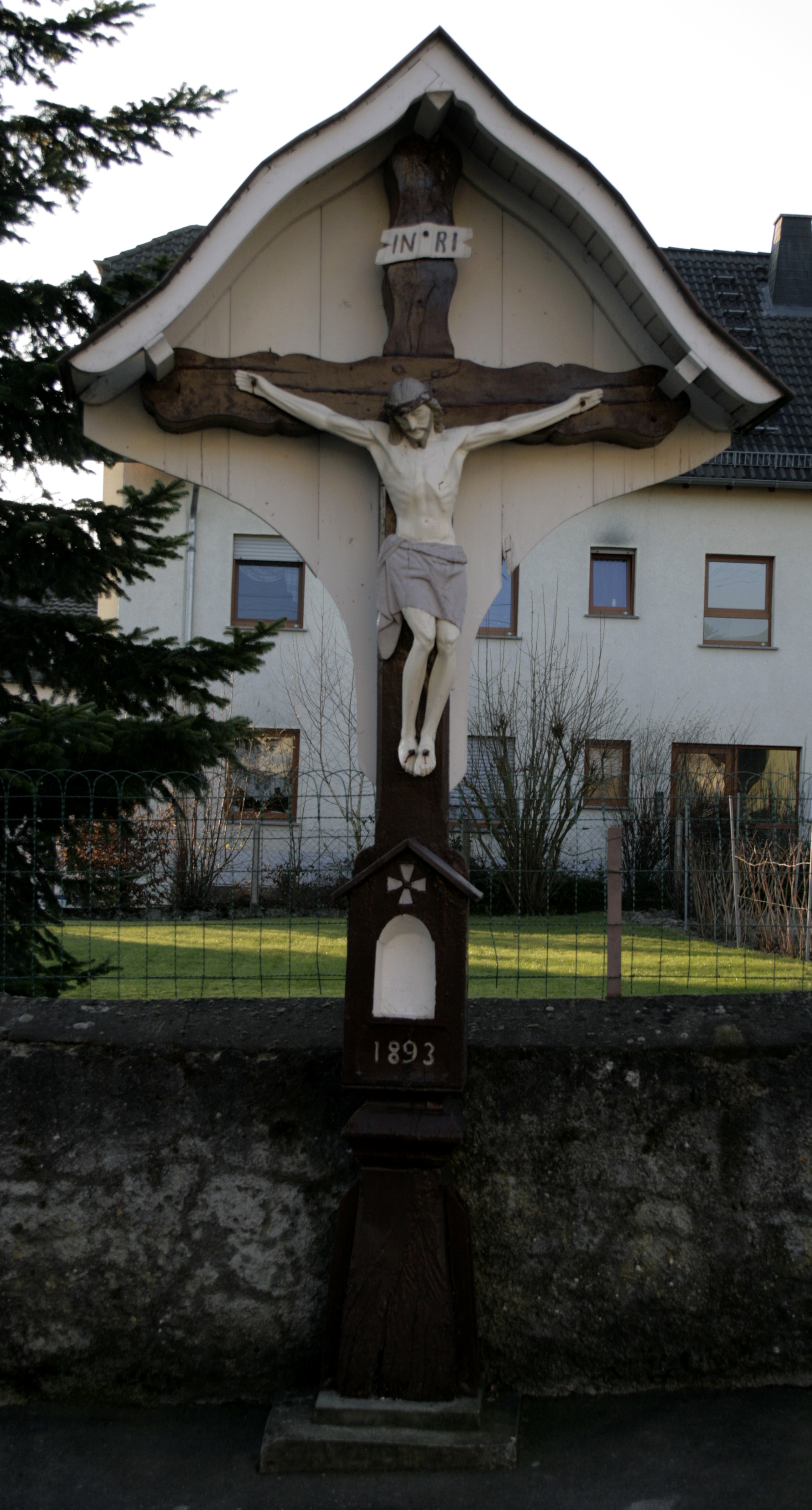 Kruzifix in Hadamar-Niederzeuzheim, Deutschland, Ortsmitte